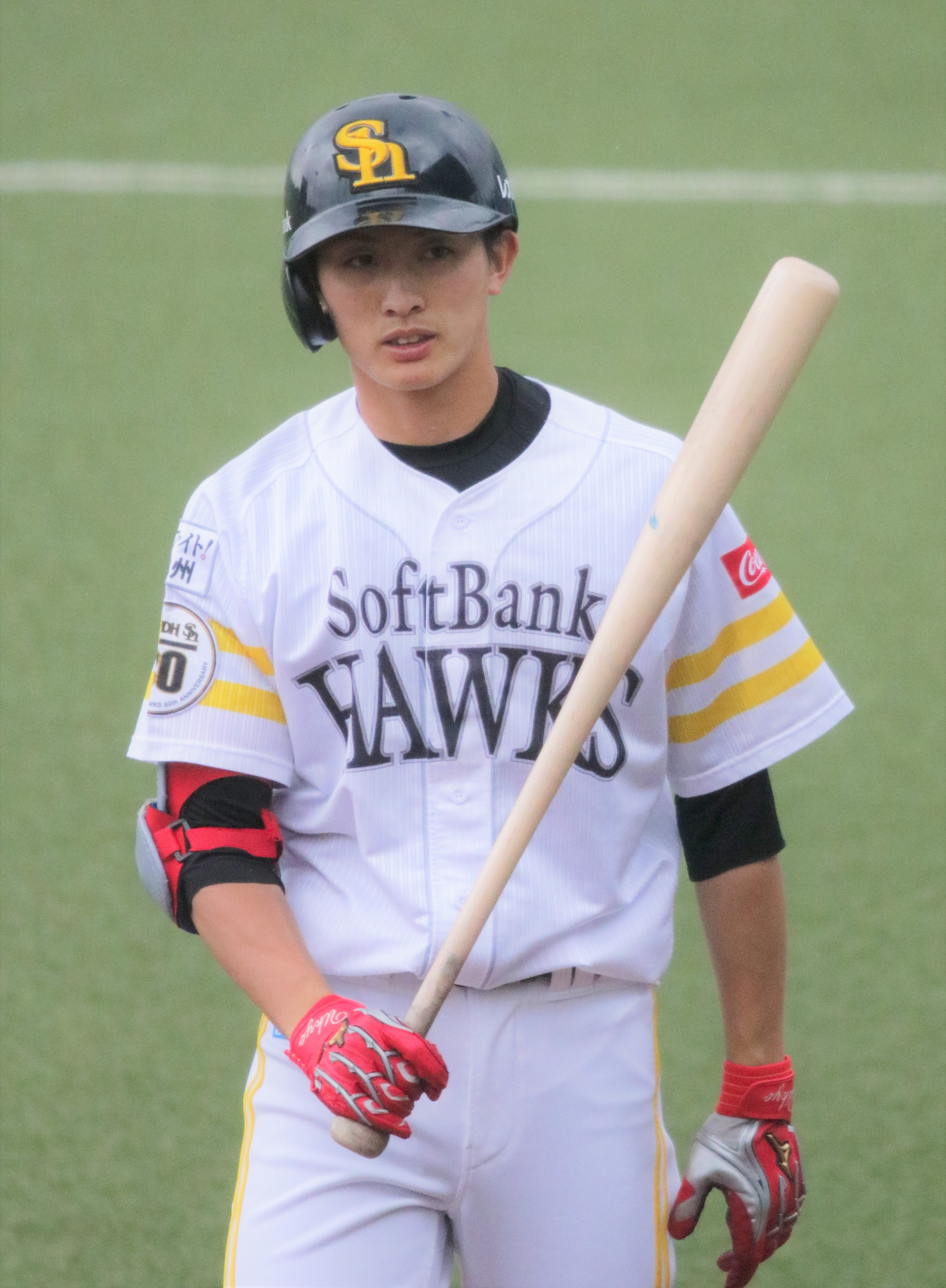 2018年6月6日 ウエスタンリーグ